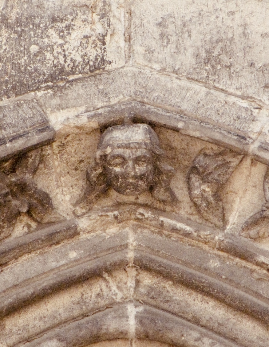 Kölner Dom: Im Scheitel des Mittelfensters der Achskapelle ist ein Kopf angebracht, der möglicherweise den ersten Dombaumeister Gerhard (1248 bis vor 1271) darstellt.